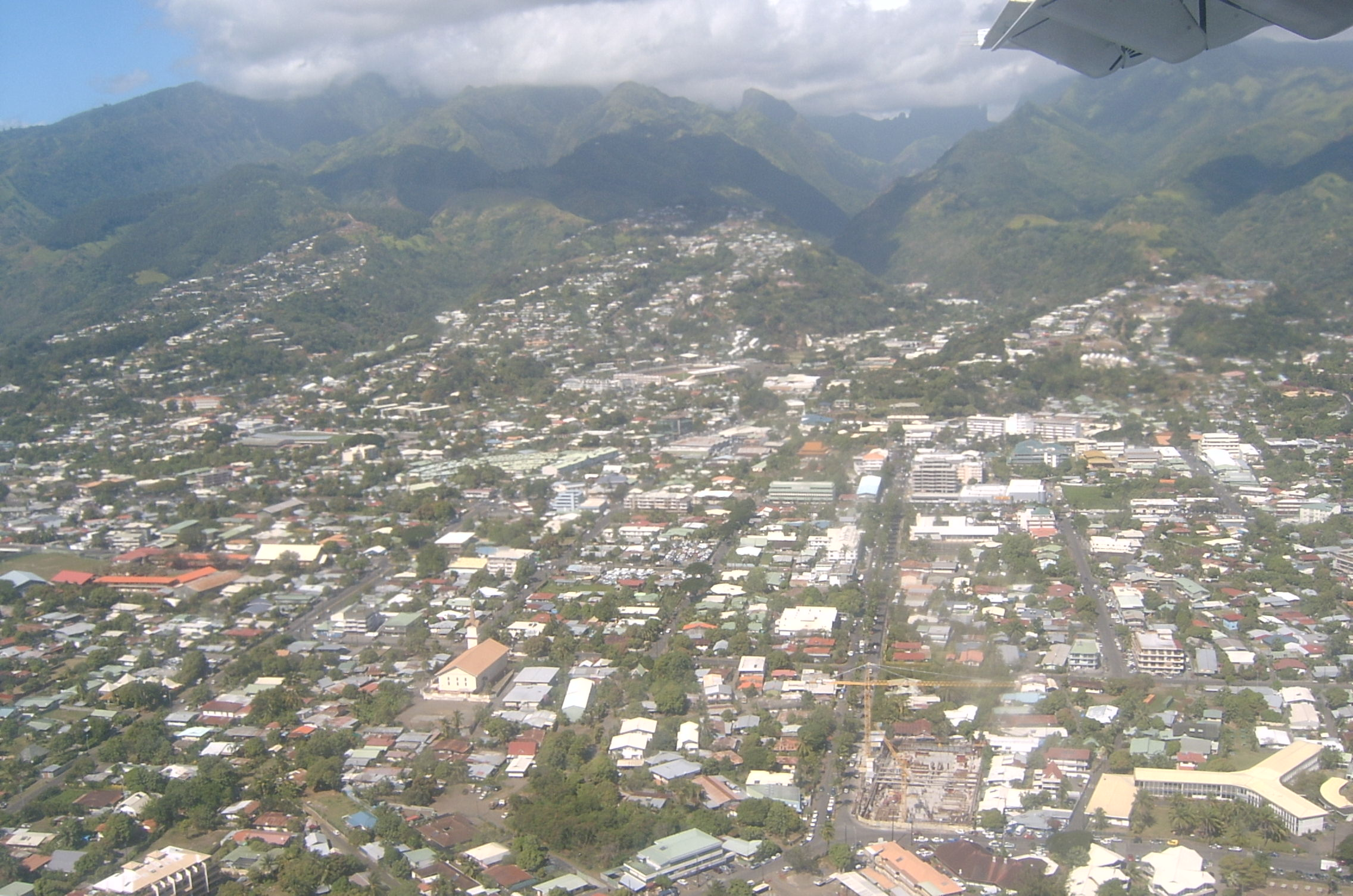 Tahiti, vue d'avion de Papeete, été 2005